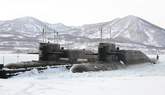 К-211 «Петропавловск-Камчатский» и К-506 «Зеленоград»